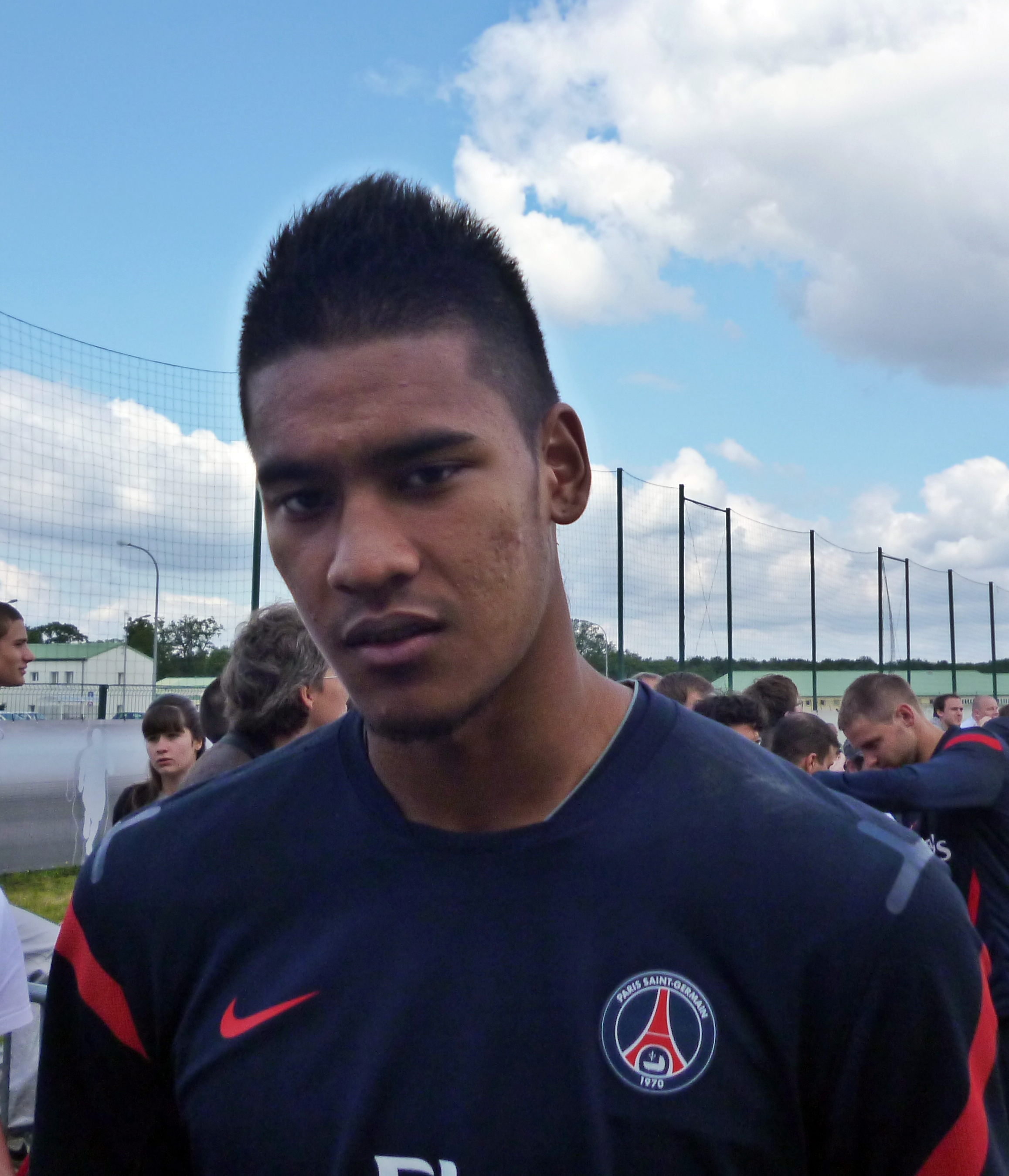 Alphonse Areola au Camp des Loges le 24 juillet 2011. Photo Vincent Hanquet pour